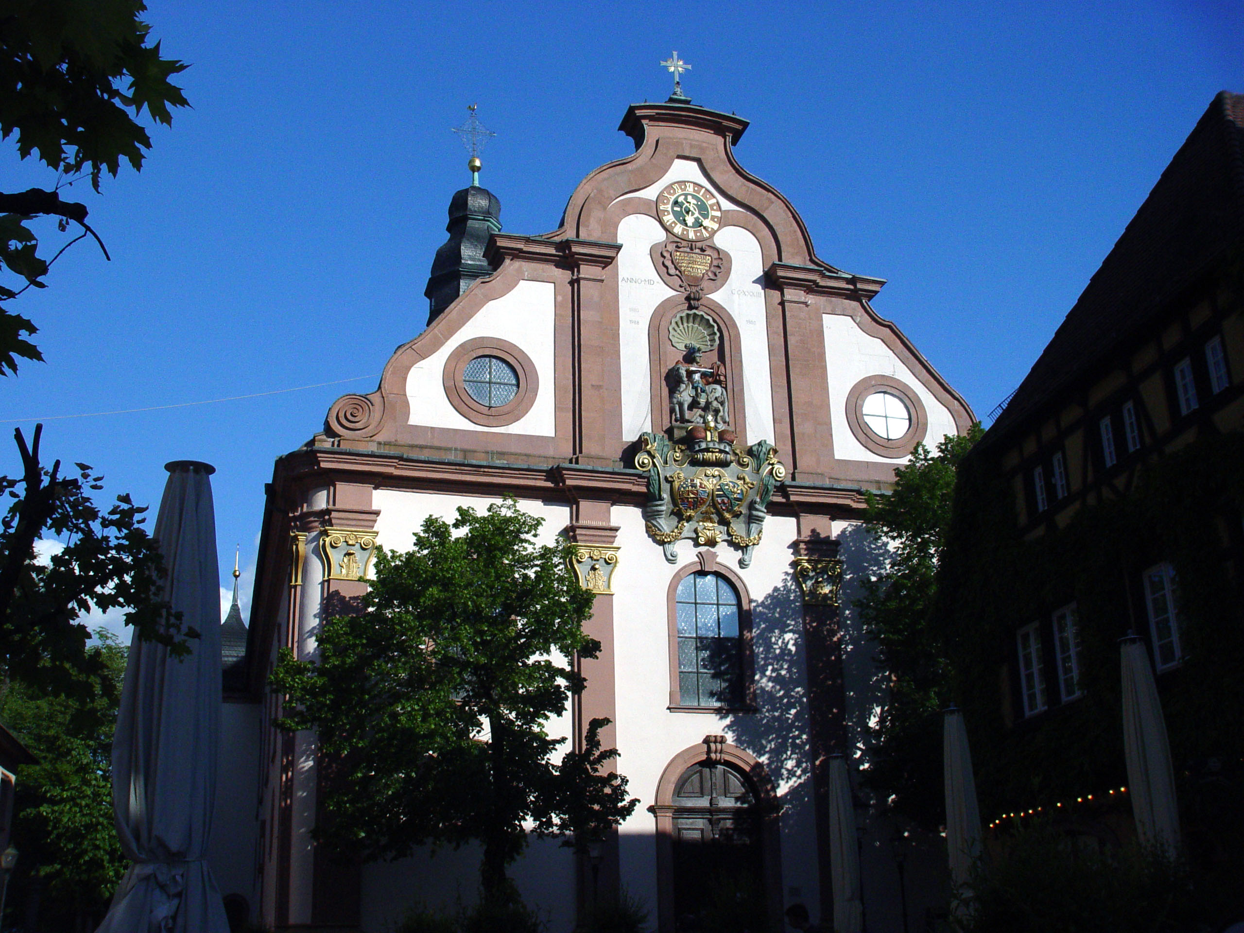 Fotografiert von Martin Dürrschnabel Martinskirche in Ettlingen.